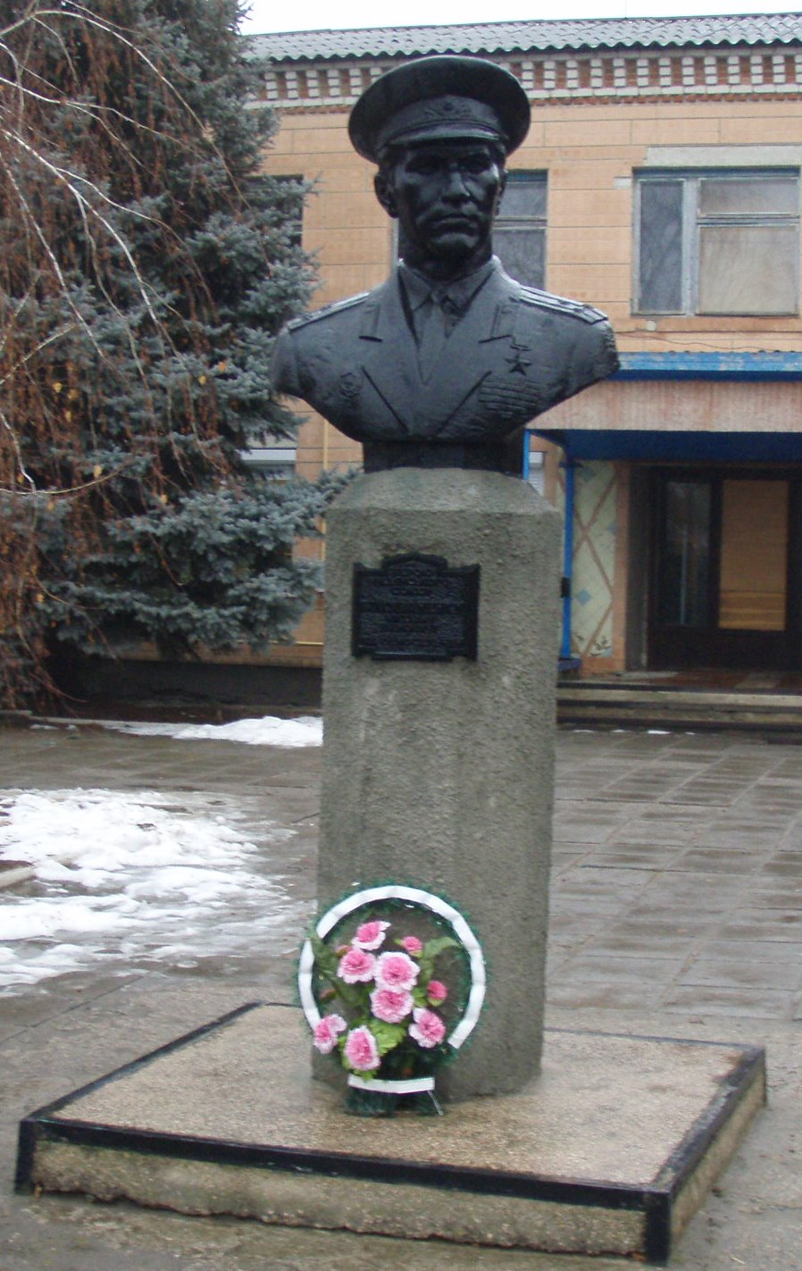 Бюст герою Советского Союза Белоиваненко Н.И. (с. Меловатка, напротив сельсовета)